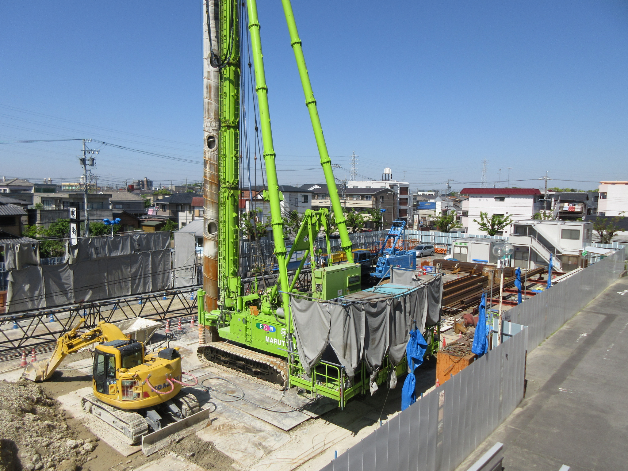 岡崎市体育館の敷地内に建設中の六名雨水ポンプ場